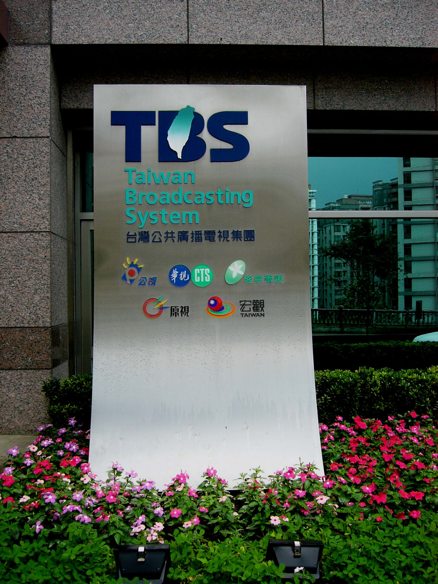 公共電視文化事業基金會A棟大樓大門右側設立的台灣公共廣播電視集團標示牌，上貼台灣公共廣播電視集團、公共電視文化事業基金會、中華電視公司、客家電視台、原住民族電視台與台灣宏觀電視標誌。2017年8月6日重訪時，此標示牌已拆除。